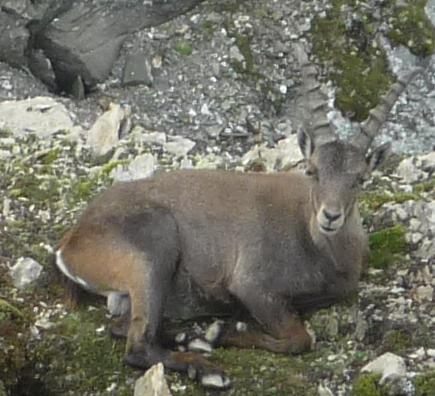 Steinbock in der Nähe des Gipfels